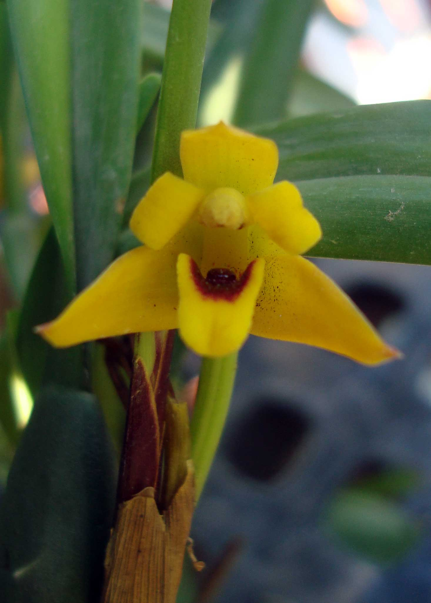 Maxillaria variabilis Amarilla